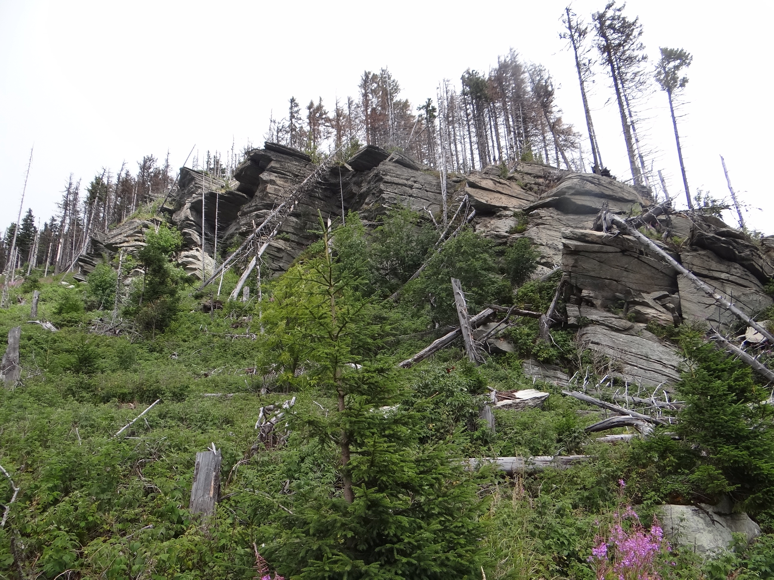 Králová skala